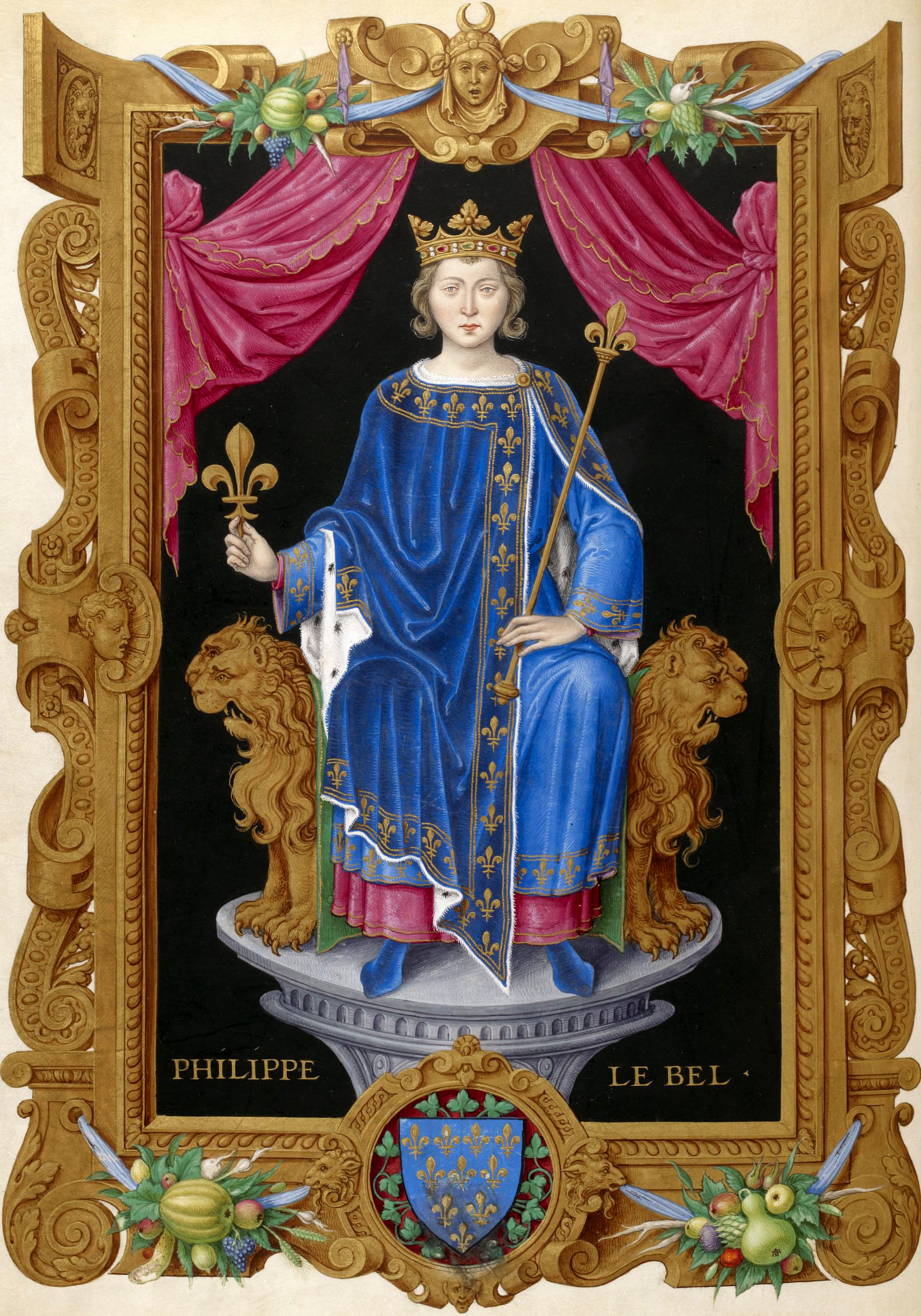 Peinture réalisée d'après l'image gravée sur le grand sceau du roi. Un médaillon, au milieu de la partie inférieure de la bordure, présente l'image du contre-sceau royal